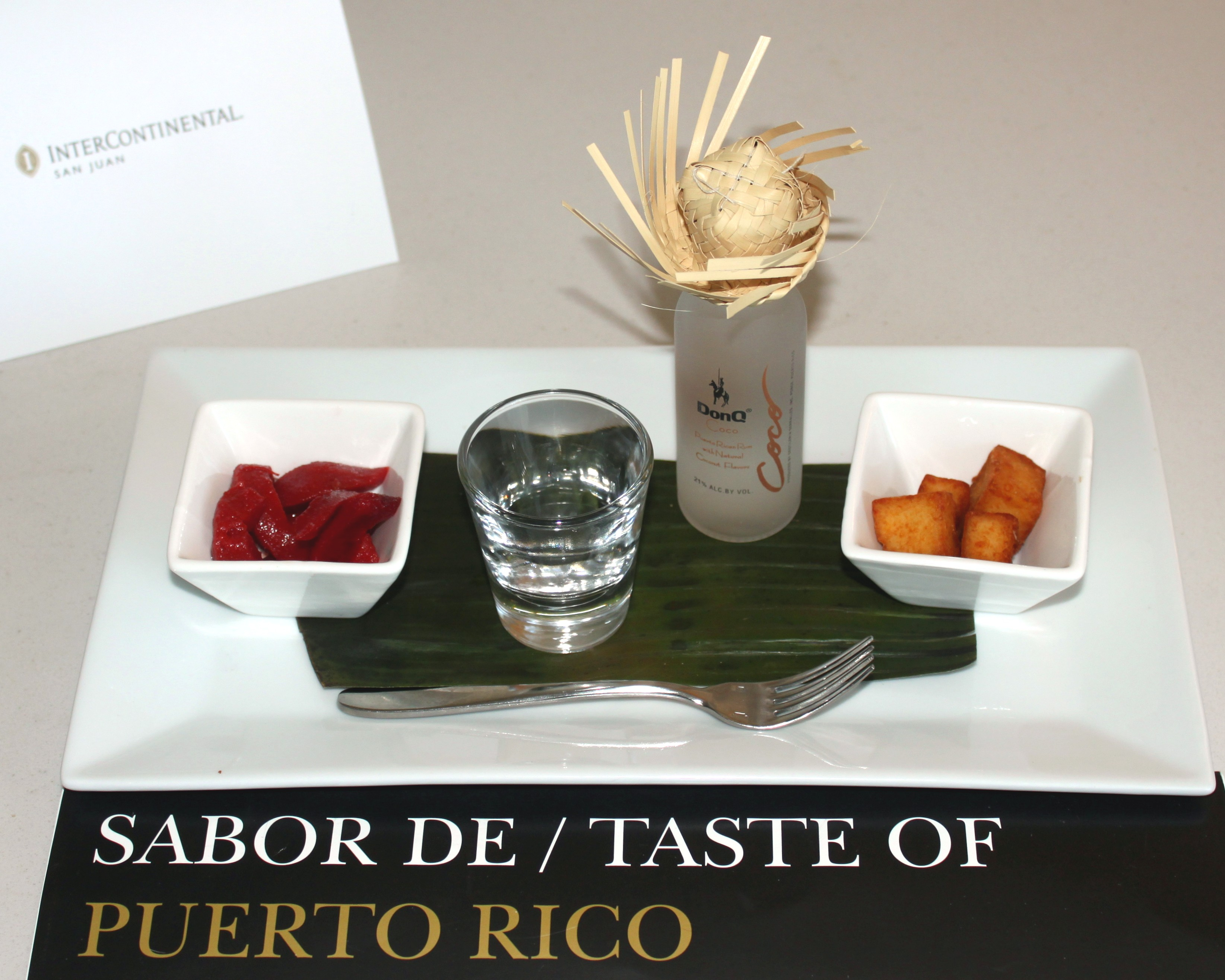 InterContinental Resort Isla Verde San Juan, Puerto Rico